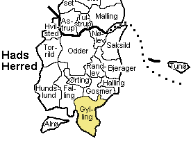 da: Kort der viser Gylling Sogn, Hads Herred, Århus Amt, Denmark. Kortet er udarbejdet af Svend-Erik Christiansen og bearbejdet af Nico-dk